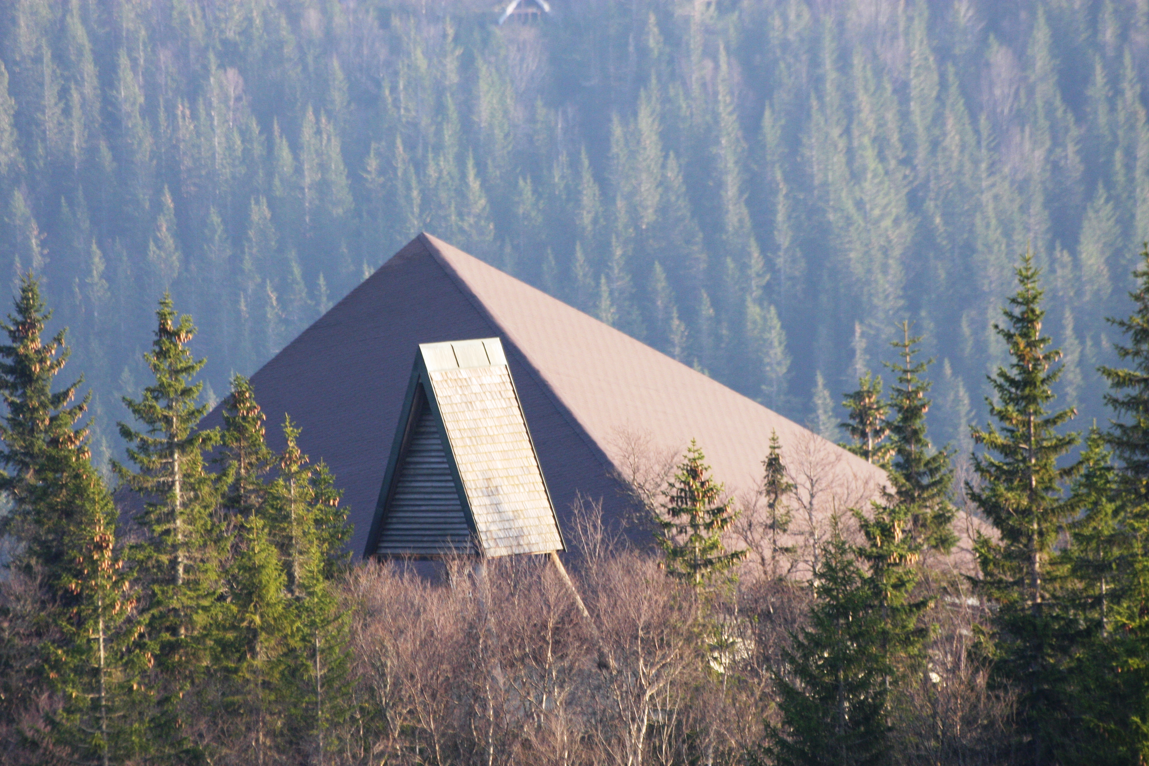 Jönnbu mountain church in Bö municipality, Telemark (Norway)